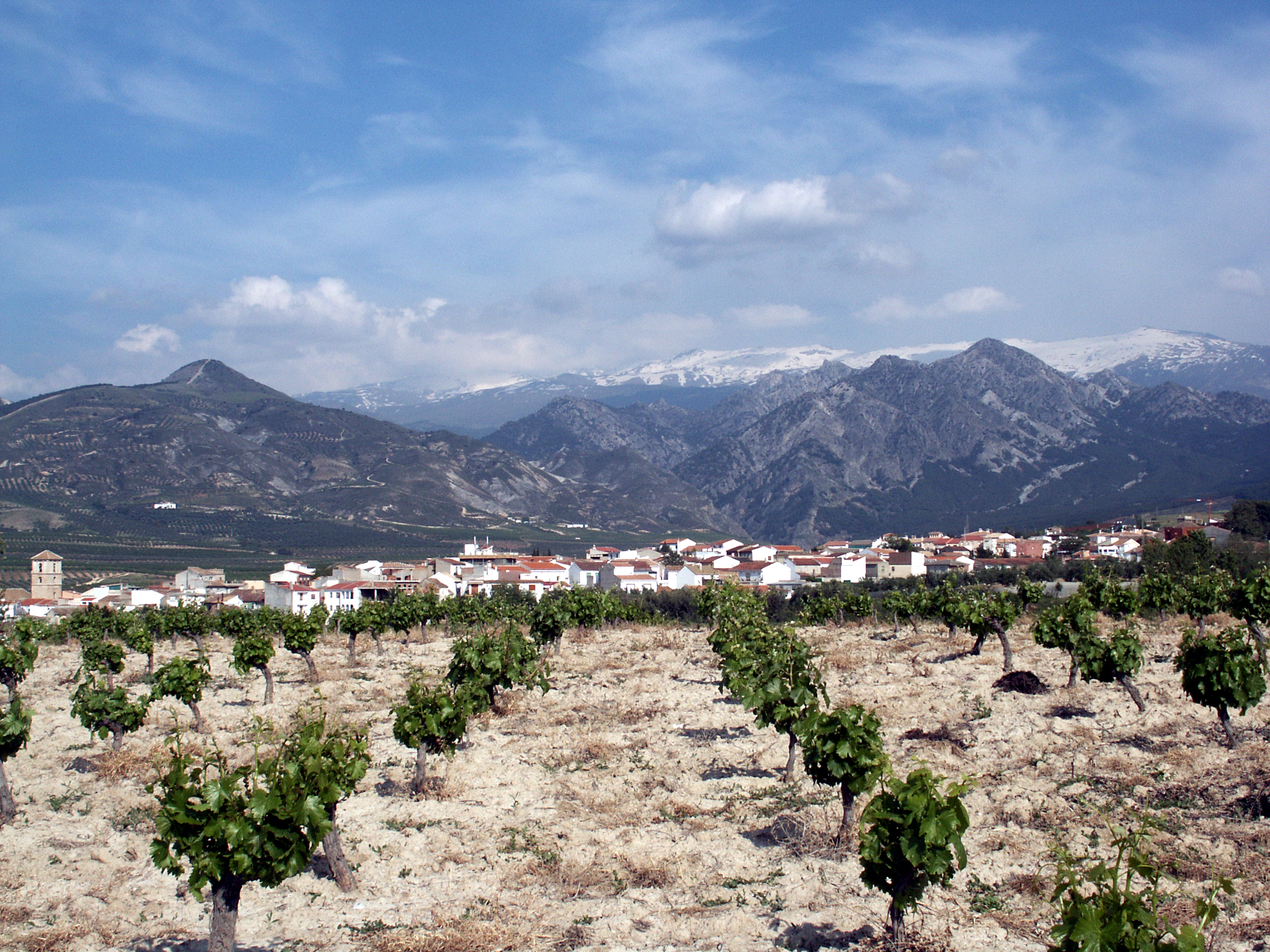 vista panoramica de dílar